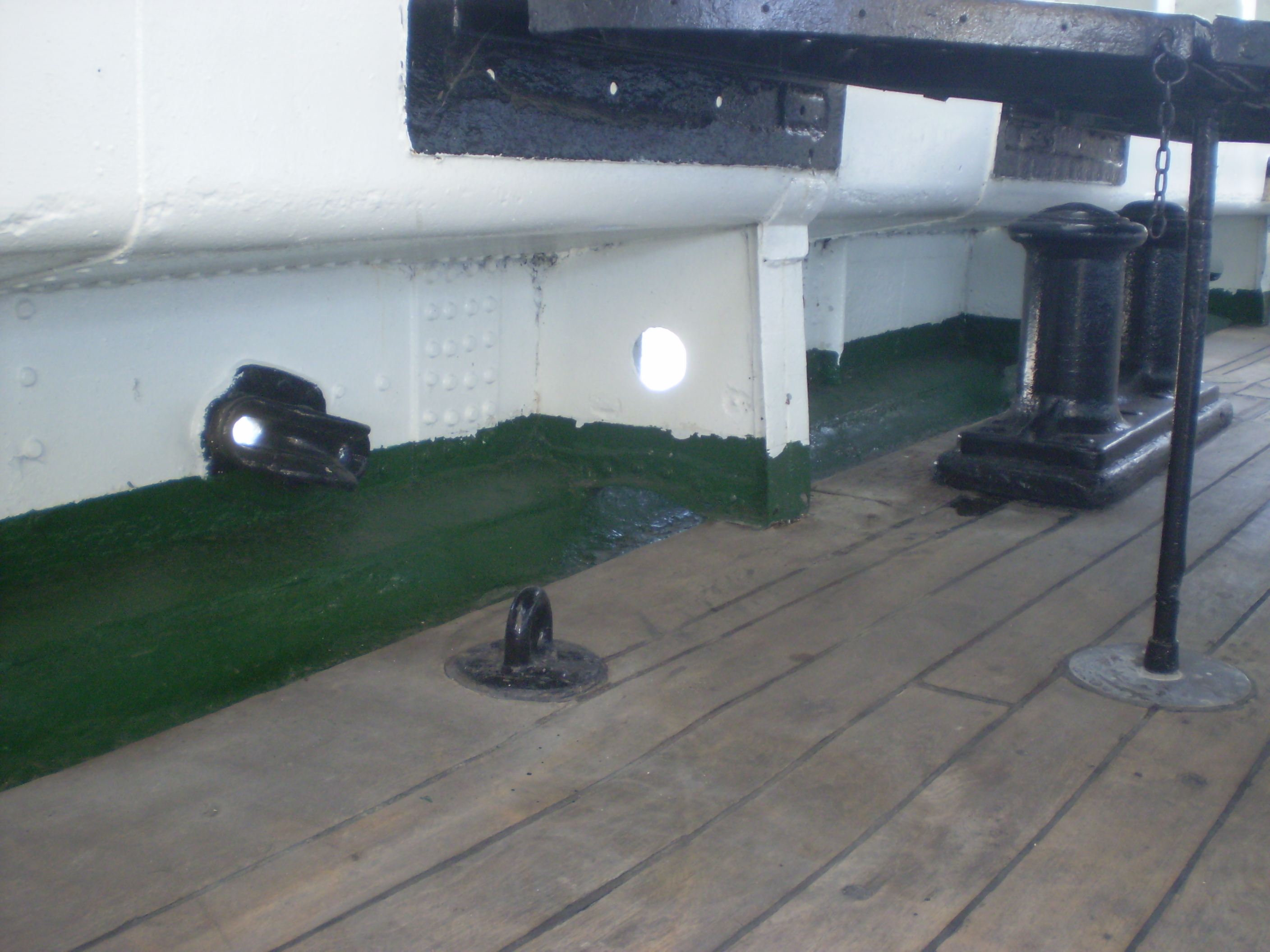 Buque Museo Fragata A.R.A. Presidente Sarmiento, amarrada en puerto Madero, Buenos Aires, Argentina (trancanil y bita)